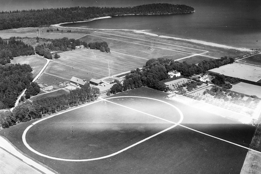 Flygfoto över Menhammar med travbanan längst fram.